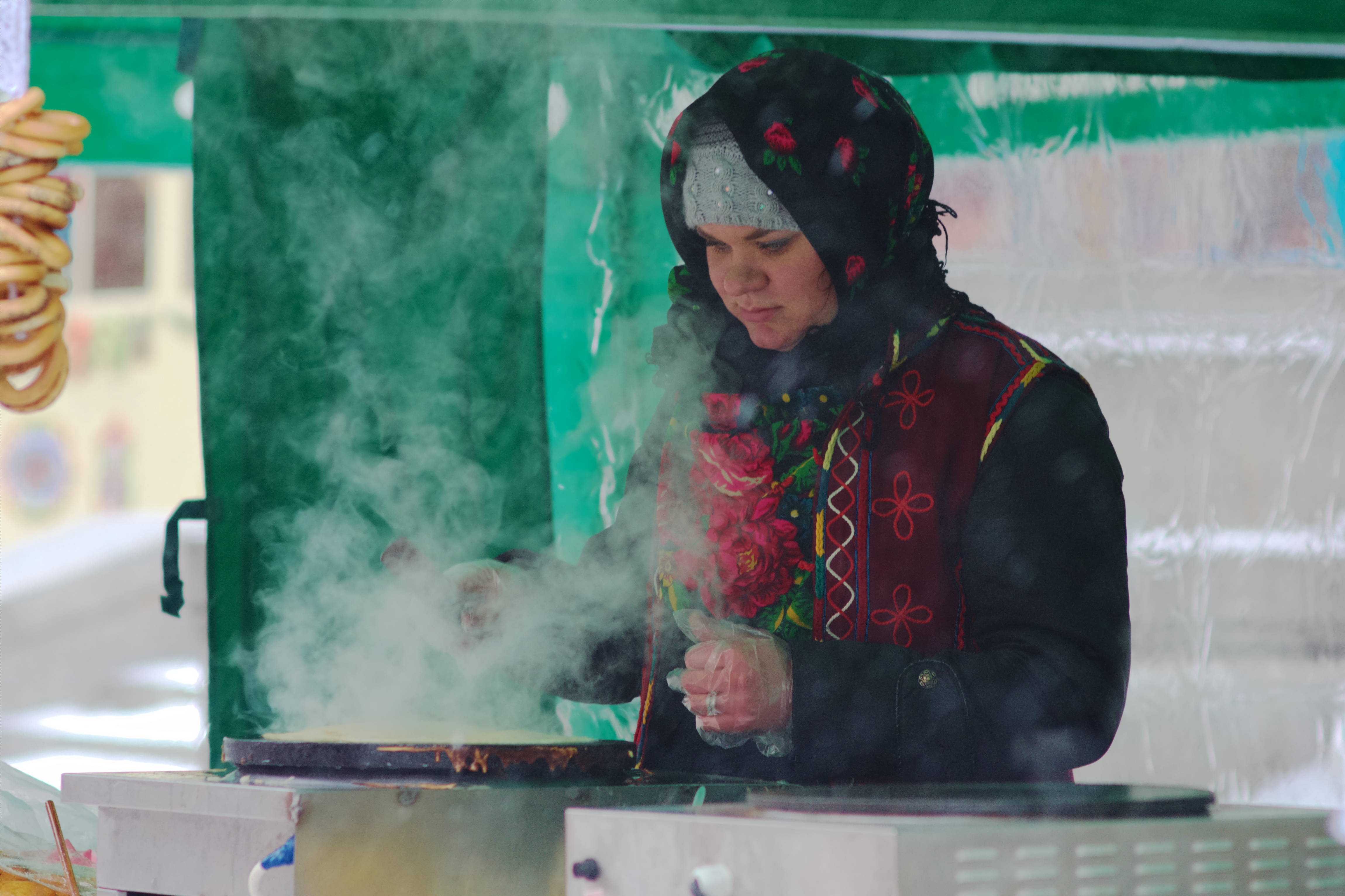 Масленица: Блины / Maslenitsa: Pancakes